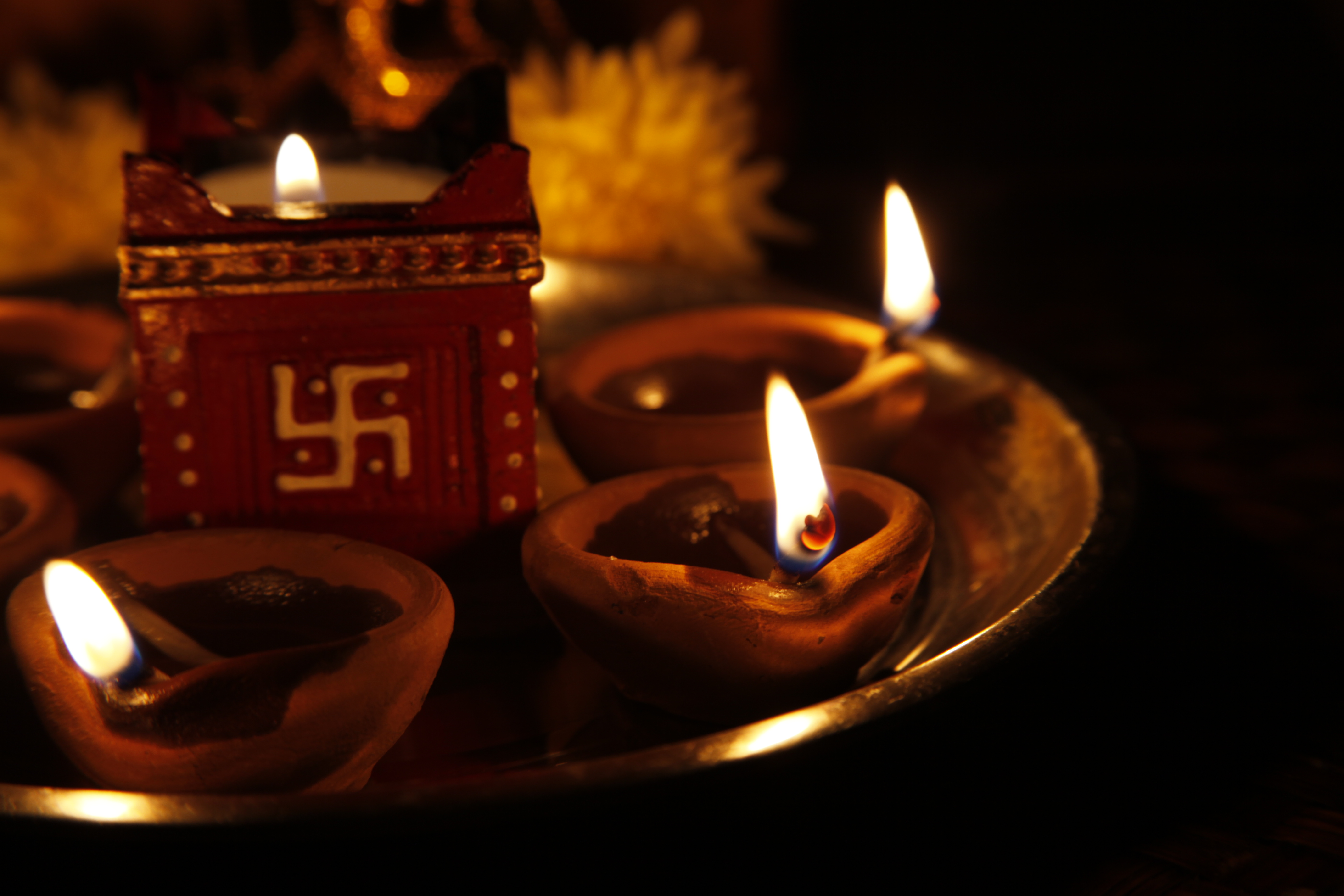 Diyas for Divali Deepavali